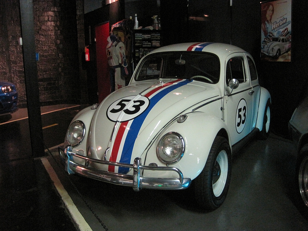 Rusty's TV & Movie Car Museum in Jackson, Tennessee. Herbie VW Beetle